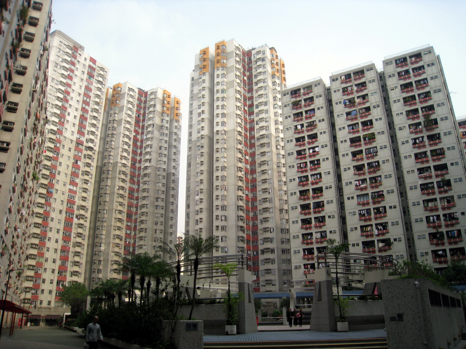 Ka Wai Chuen